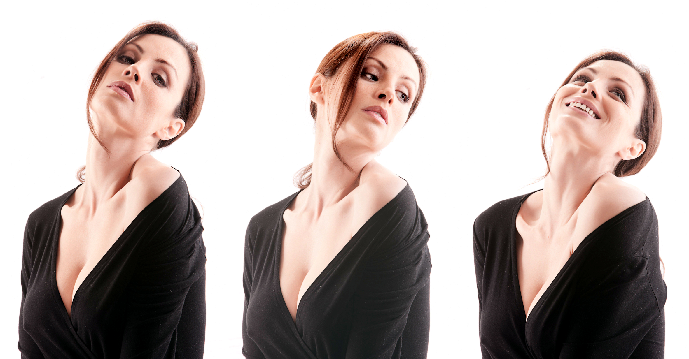 Ana Álvarez. Actriz española fotografiada por Gonzo Suárez